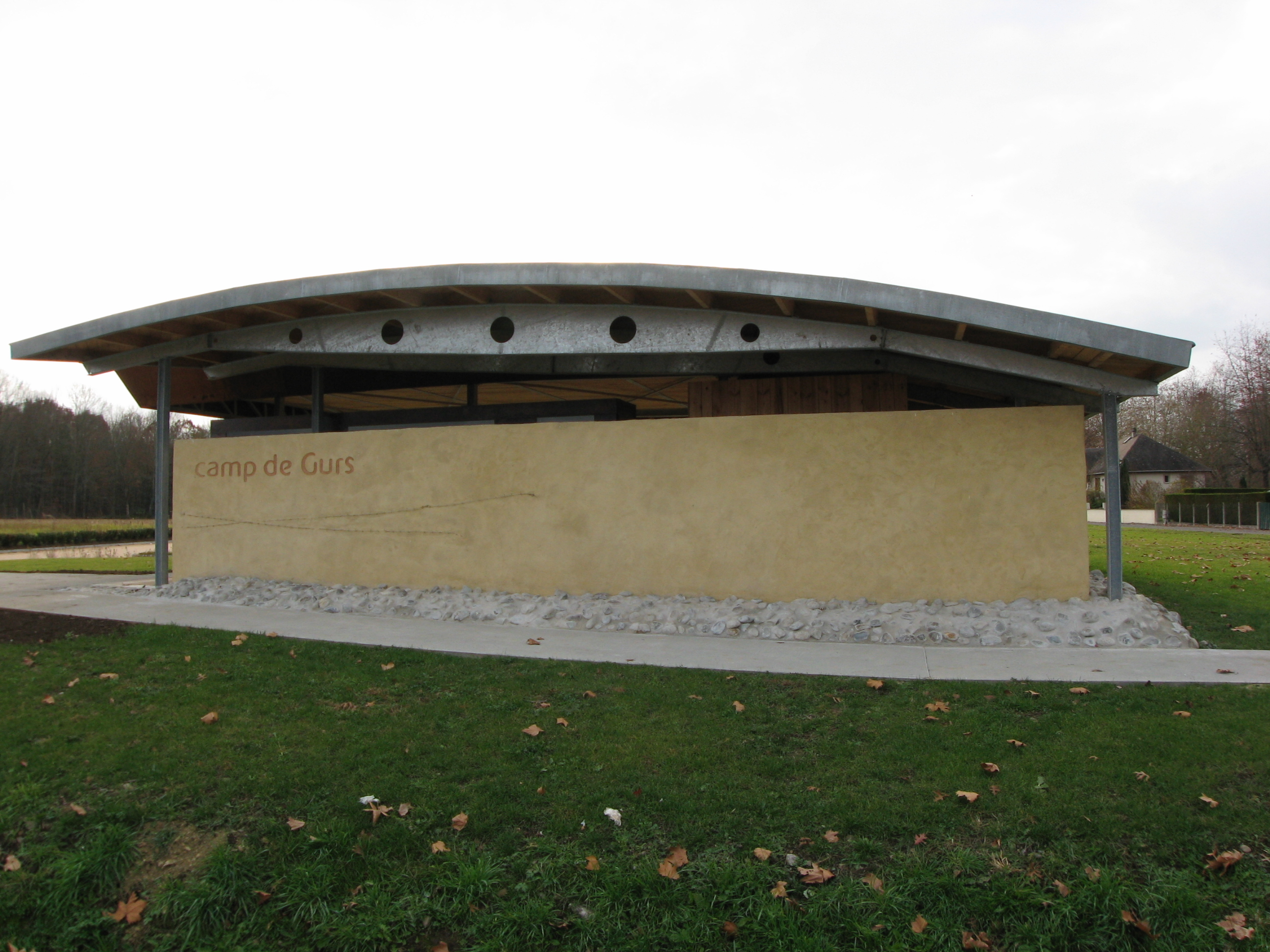 Vue générale du mémorial récent de Gurs (Pyrénées-Atlantiques) (Pyrénées).